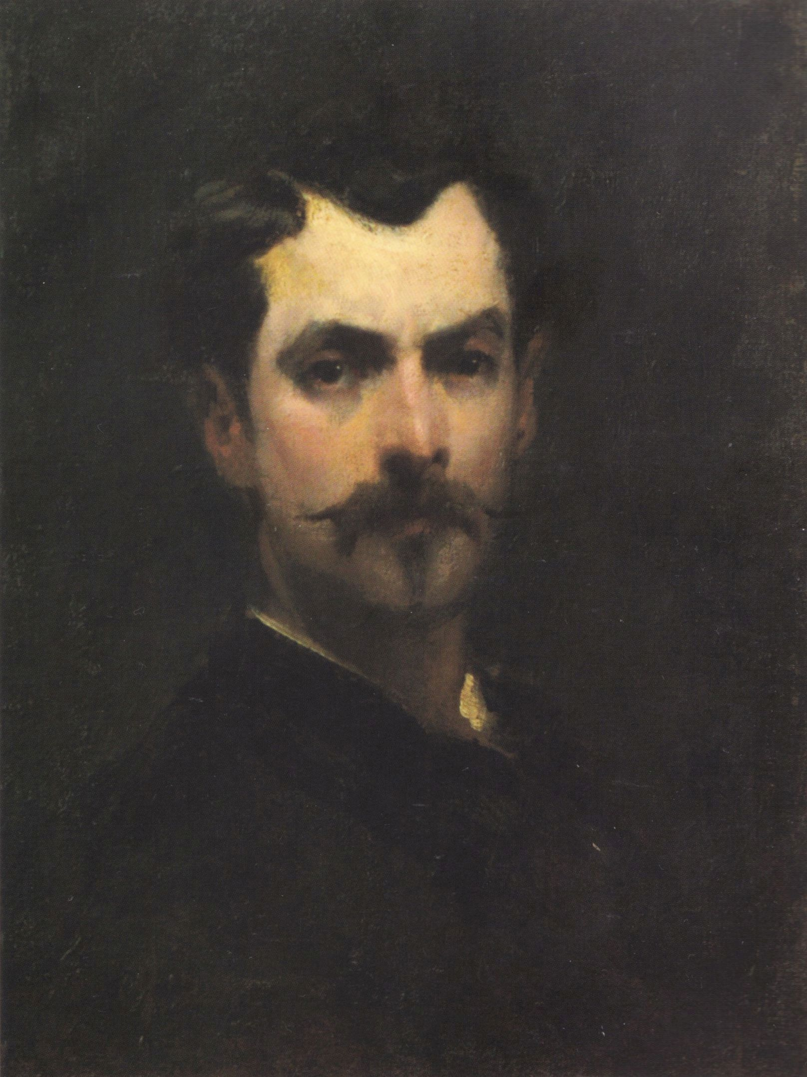 George Demetrescu Mirea - Autoportret, ulei pe pânză, Muzeul Naţional de Artă al României..